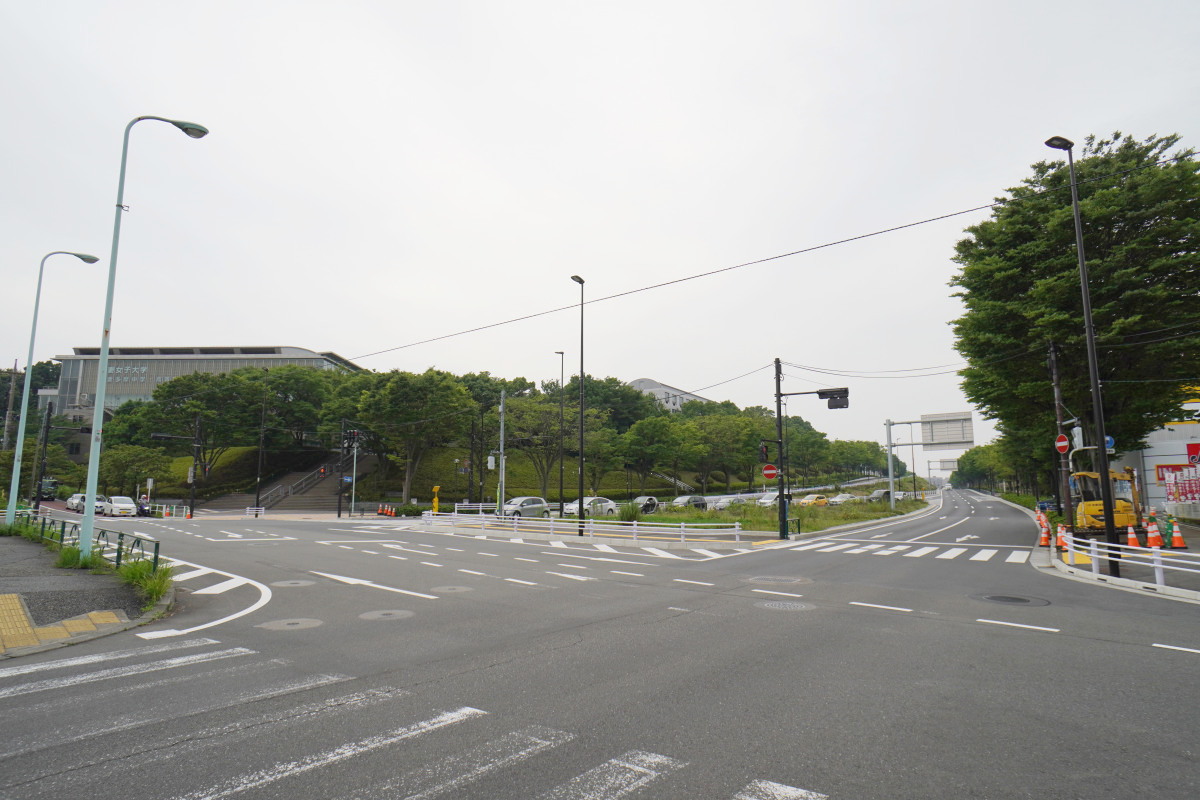 南多摩尾根幹線道路 唐木田区間（東京都多摩市唐木田）